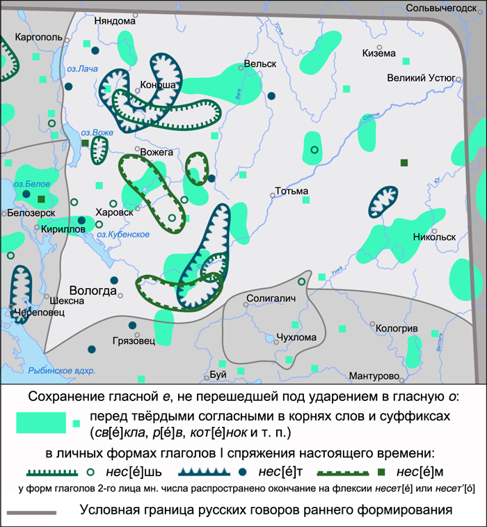 Карта распространения случаев сохранения гласной е, не перешедшей в о под ударением перед твёрдыми согласными в корнях слов и суффиксах, а также наличия ударной гласной /е/ в личных формах глаголов I спряжения настоящего времени в вологодских говорах. Источники: Захарова К. Ф., Орлова В. Г., Сологуб А. И., Строганова Т. Ю. Образование севернорусского наречия и среднерусских говоров / Ответственный редактор В. Г. Орлова. — М.: «Наука», 1970. — С. 23 (Карта 3. Сохранение случаев с гласным /е/, не перешедшим в /о/ под ударением), С. 26 (Карта 4. Ударенный гласный /е/ в личных формах глаголов I спряжения настоящего времени)